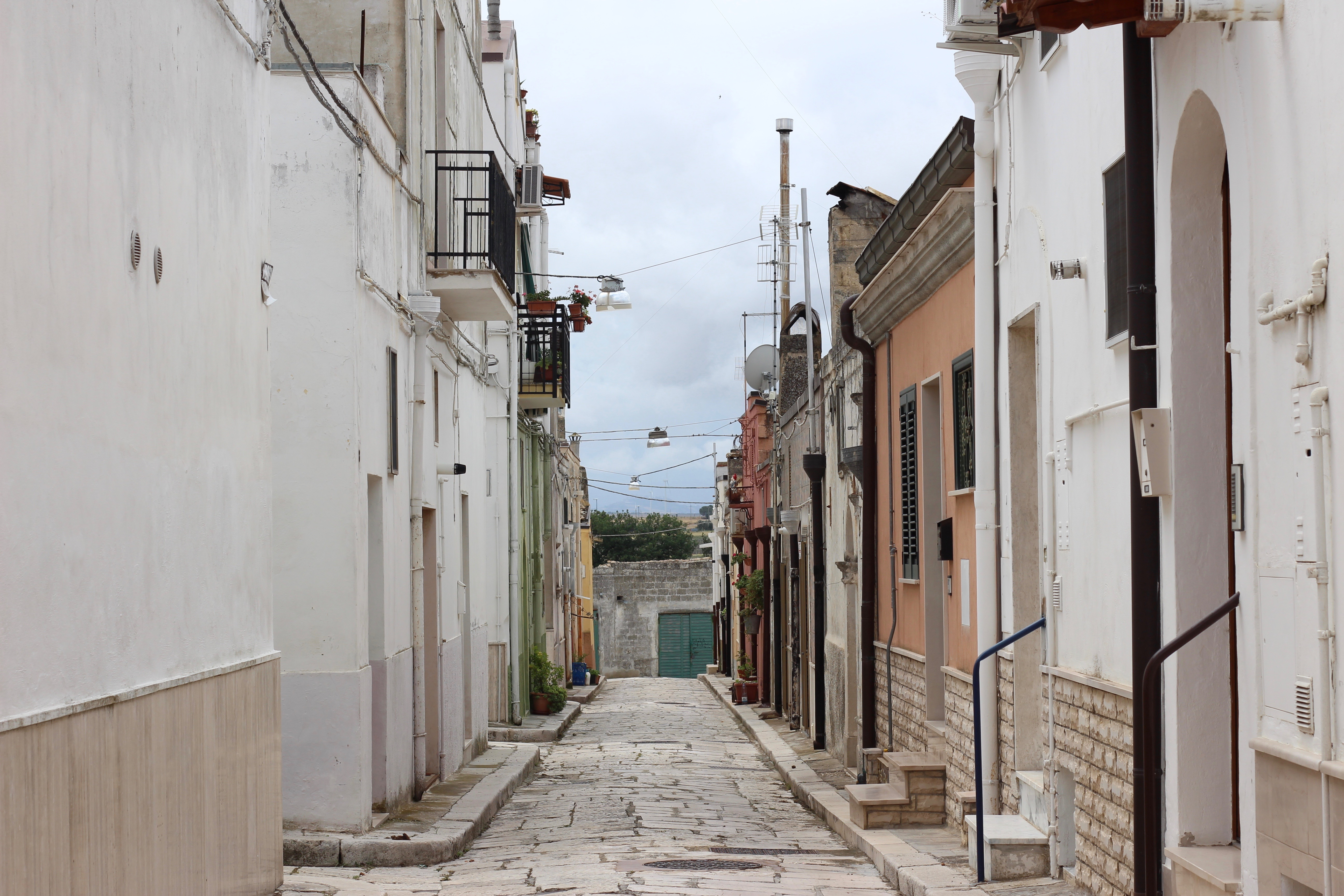 via Acerenza, Spinazzola - Borgo Saraceno